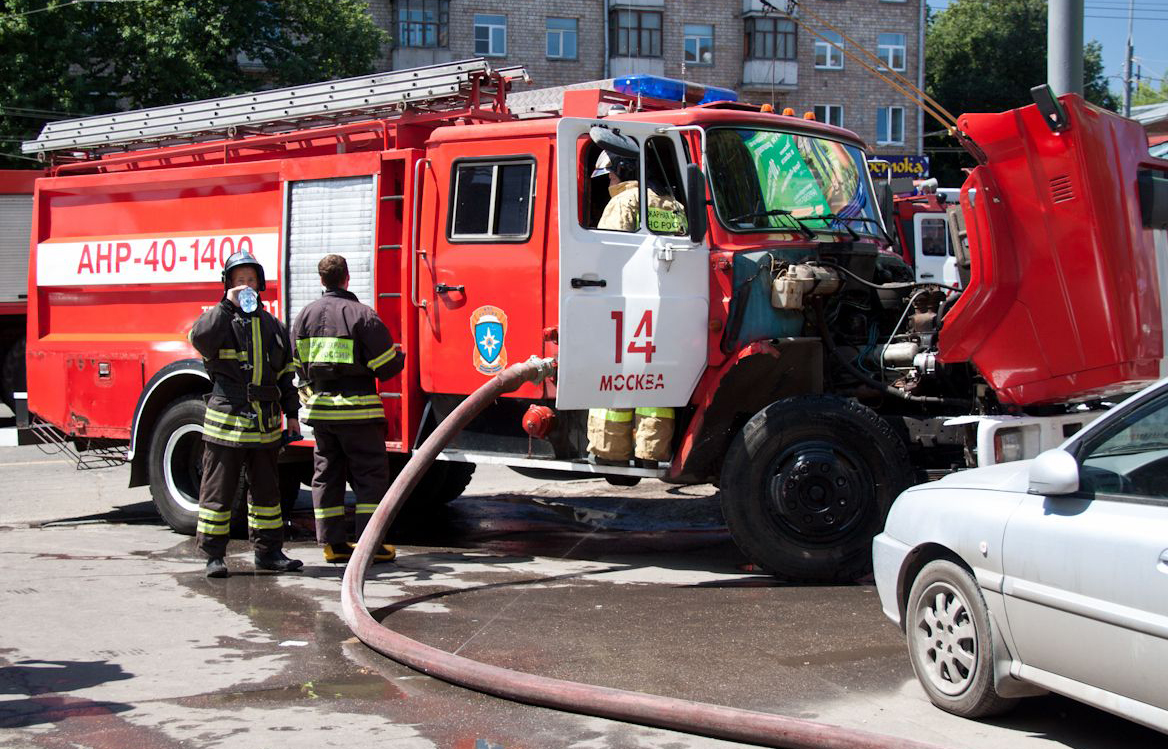 Автомобиль насосно-рукавный